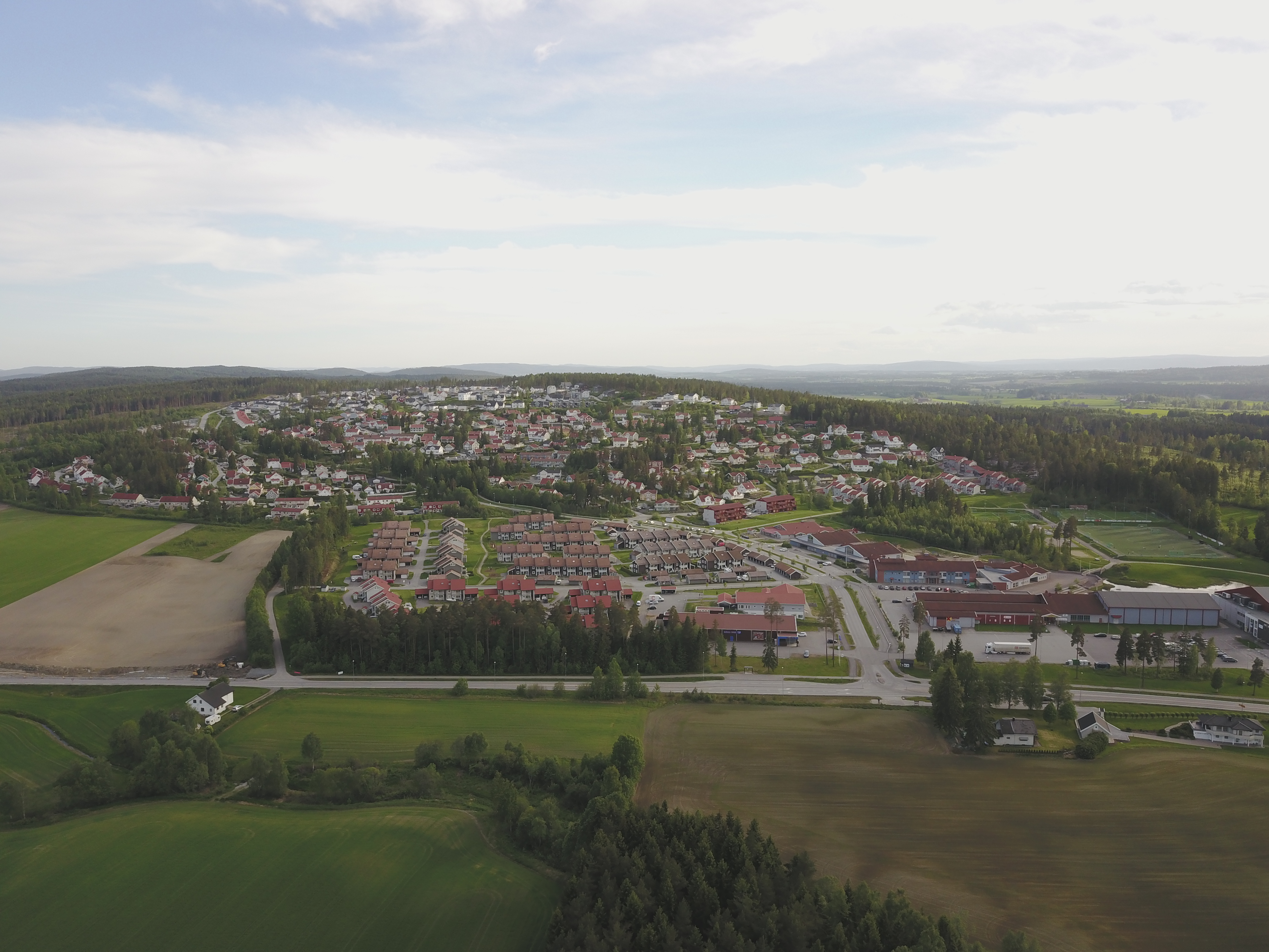 Neskollen i Nes